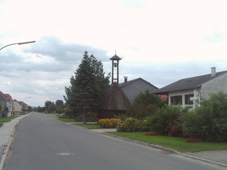 Dürnbach, Burgenland, Austria